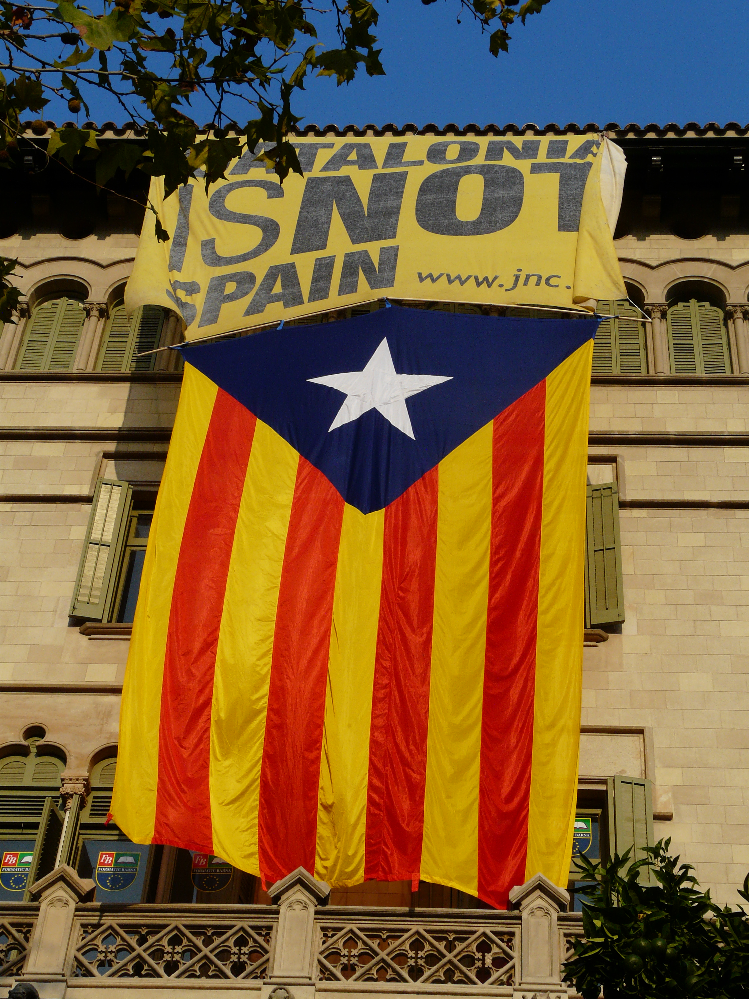 Casa Vídua Marfà (Barcelona) Object location41° 23′ 35.56″ N, 2° 09′ 51.45″ E